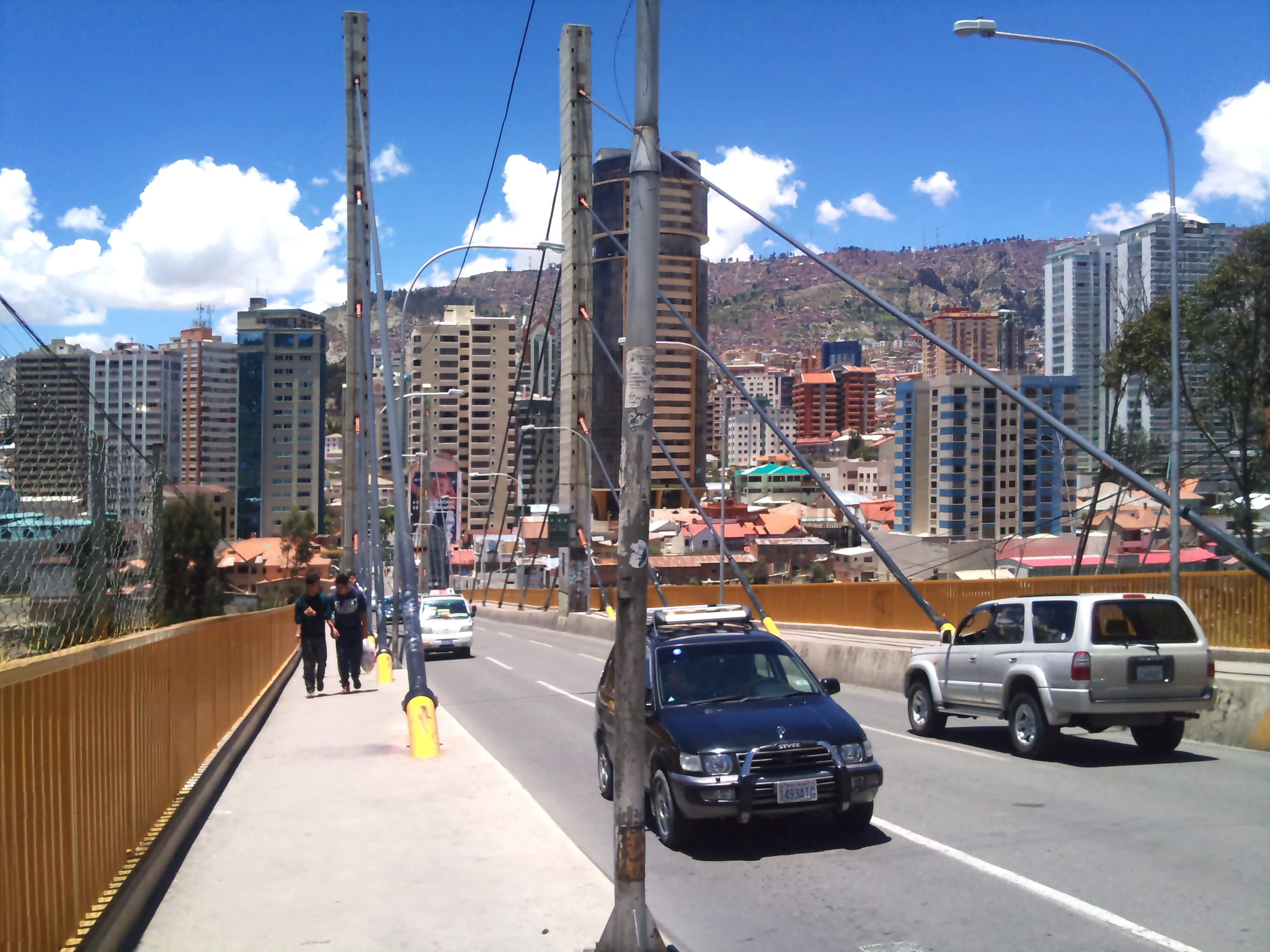 Vista de los edificios de Sopocachi desde el Puente De Las Américas